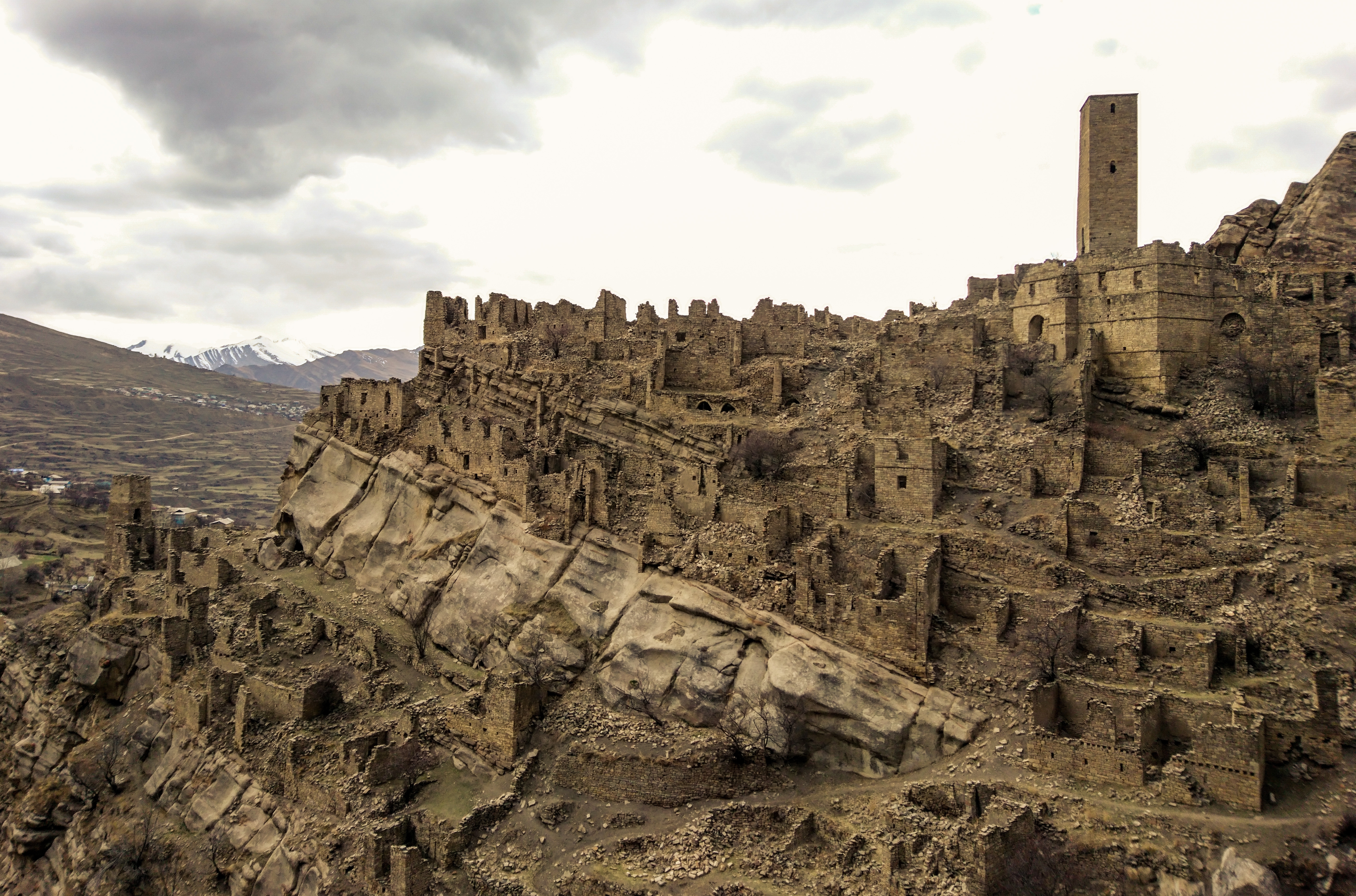 Старый Кахиб